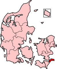 Møn, Denmark